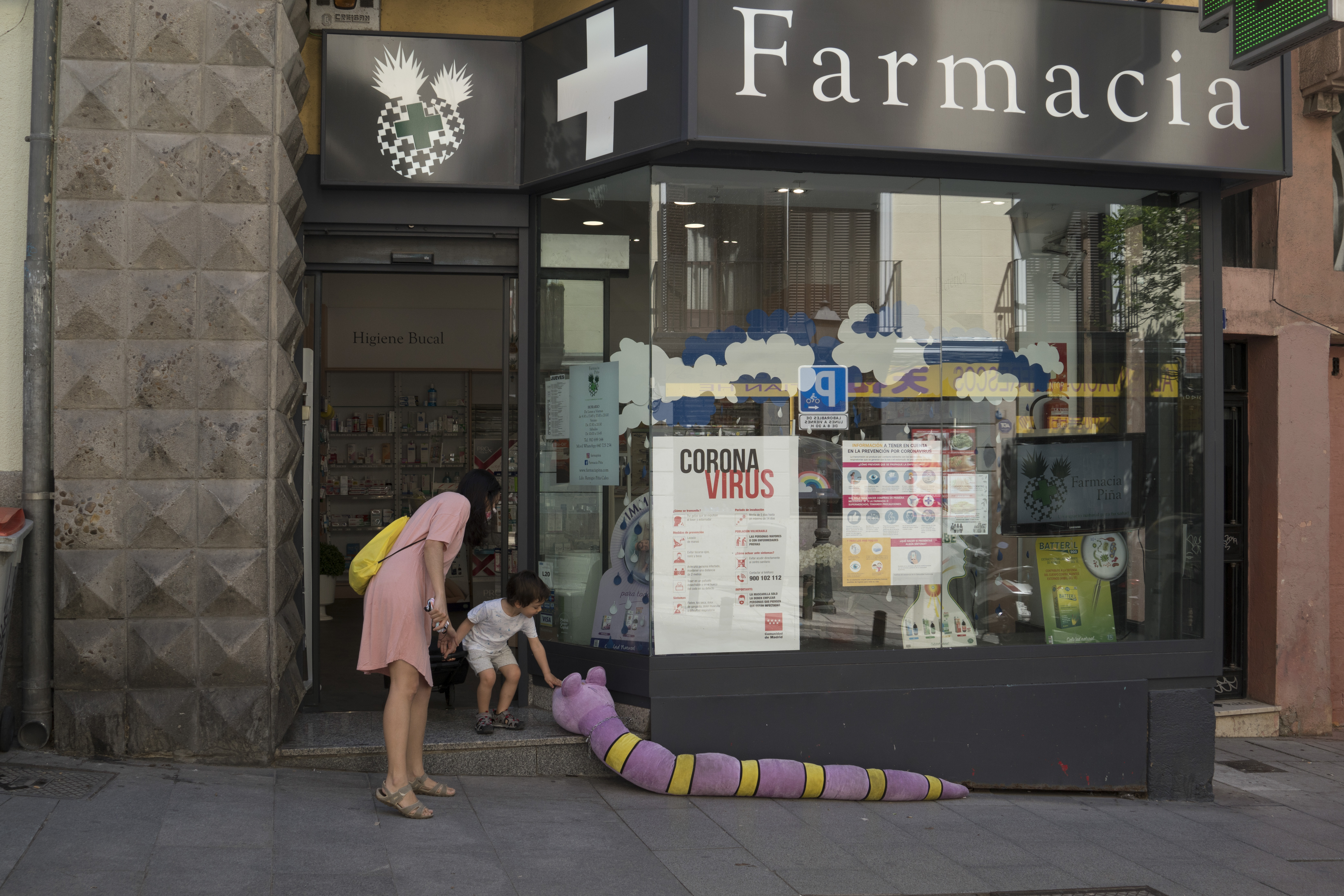 Lavapiés. Madrid. 20 de mayo de 2020